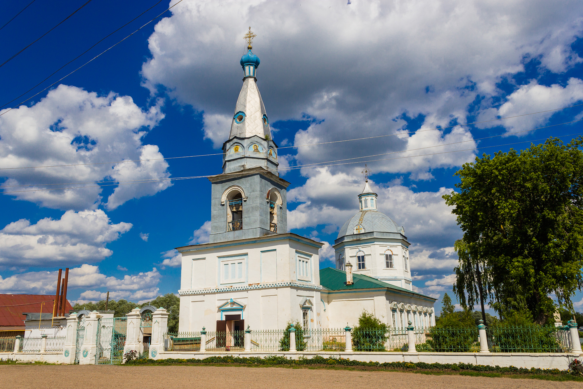 Богоявленский собор с интерьером: улица Красноармейская, 79, Малмыж, Малмыжский район, Кировская область